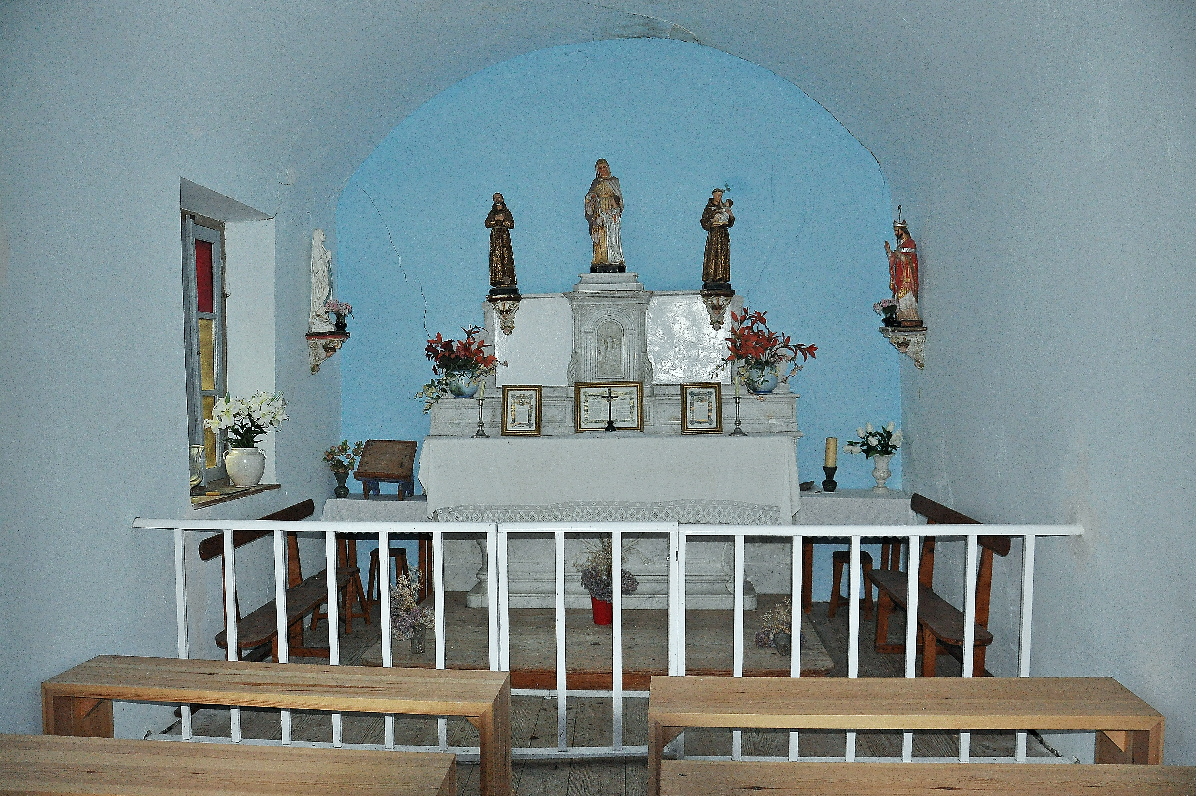 Valle de Aran-2016